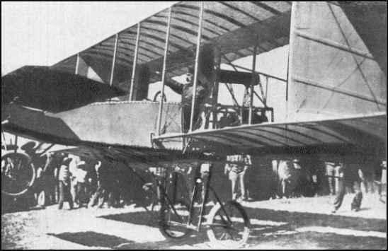 Voisin foi o biplano utilizado por Alberto Braniff, aviador mexicano, no primeiro vôo de um avião no México (8 janeiro de 1910).